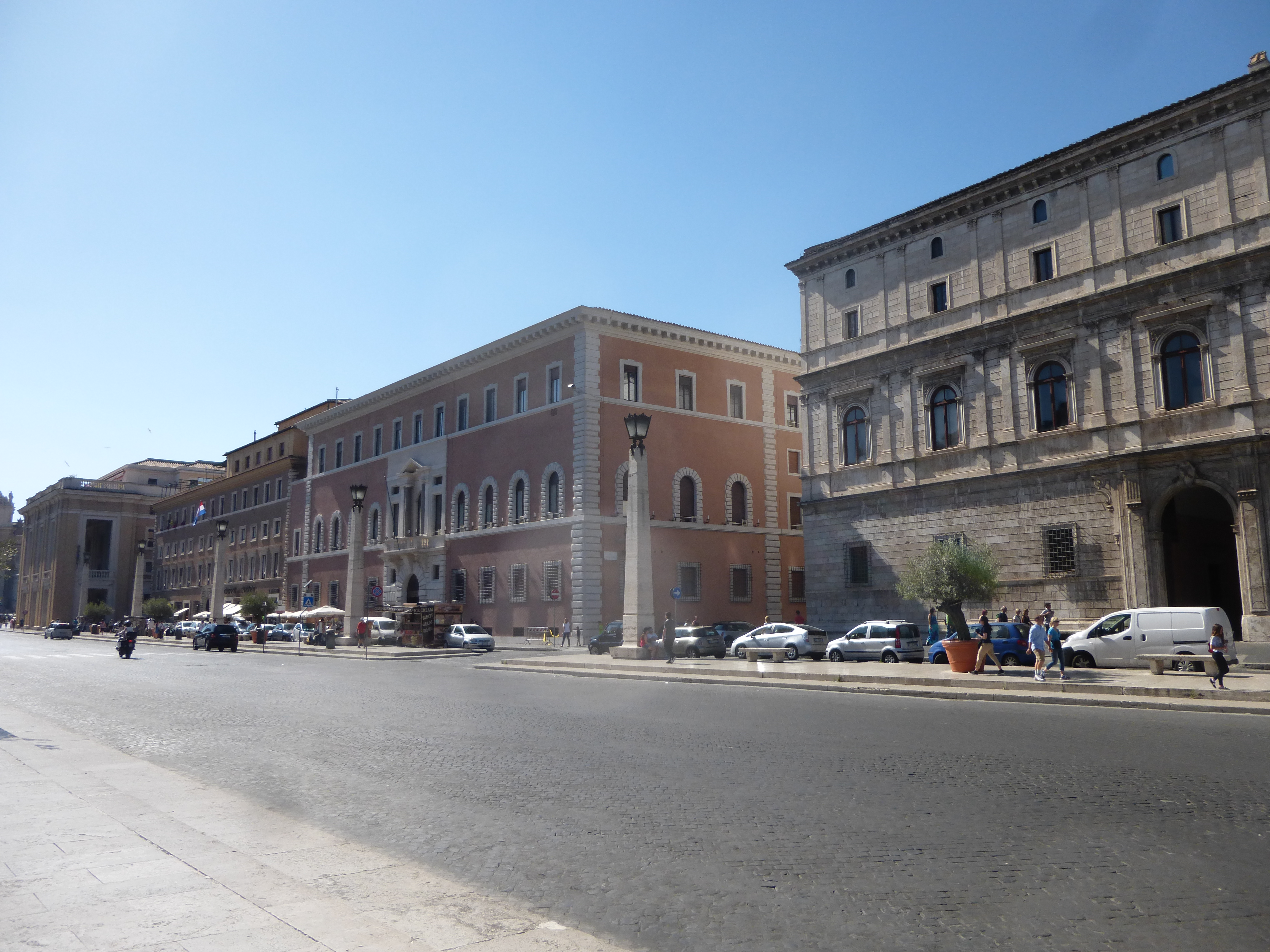 Roma, via della Conciliazione. Da sinistra palazzo Rusticucci Accoramboni, palazzo dei Convertendi, palazzo Giraud-Torlonia.